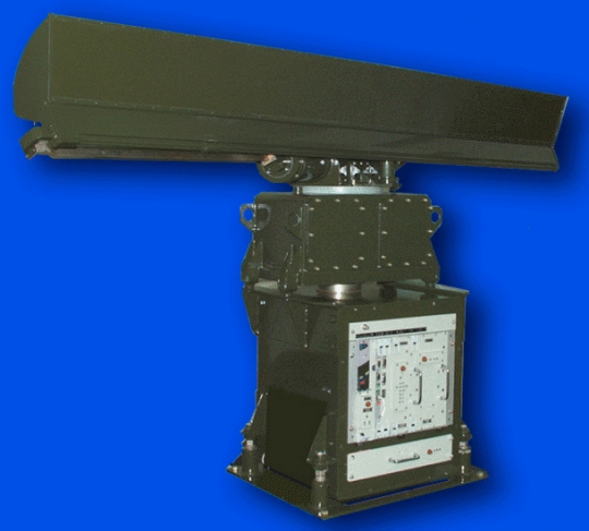 Фото РЛС «Дельта-М»